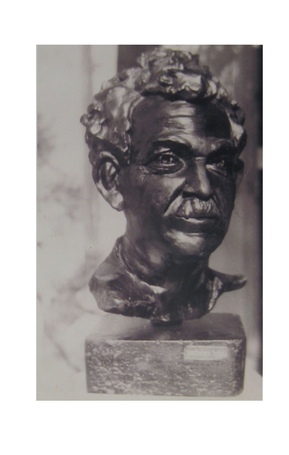 פרוטומה של ברל כצנלסון מאת זאב צורנמל.